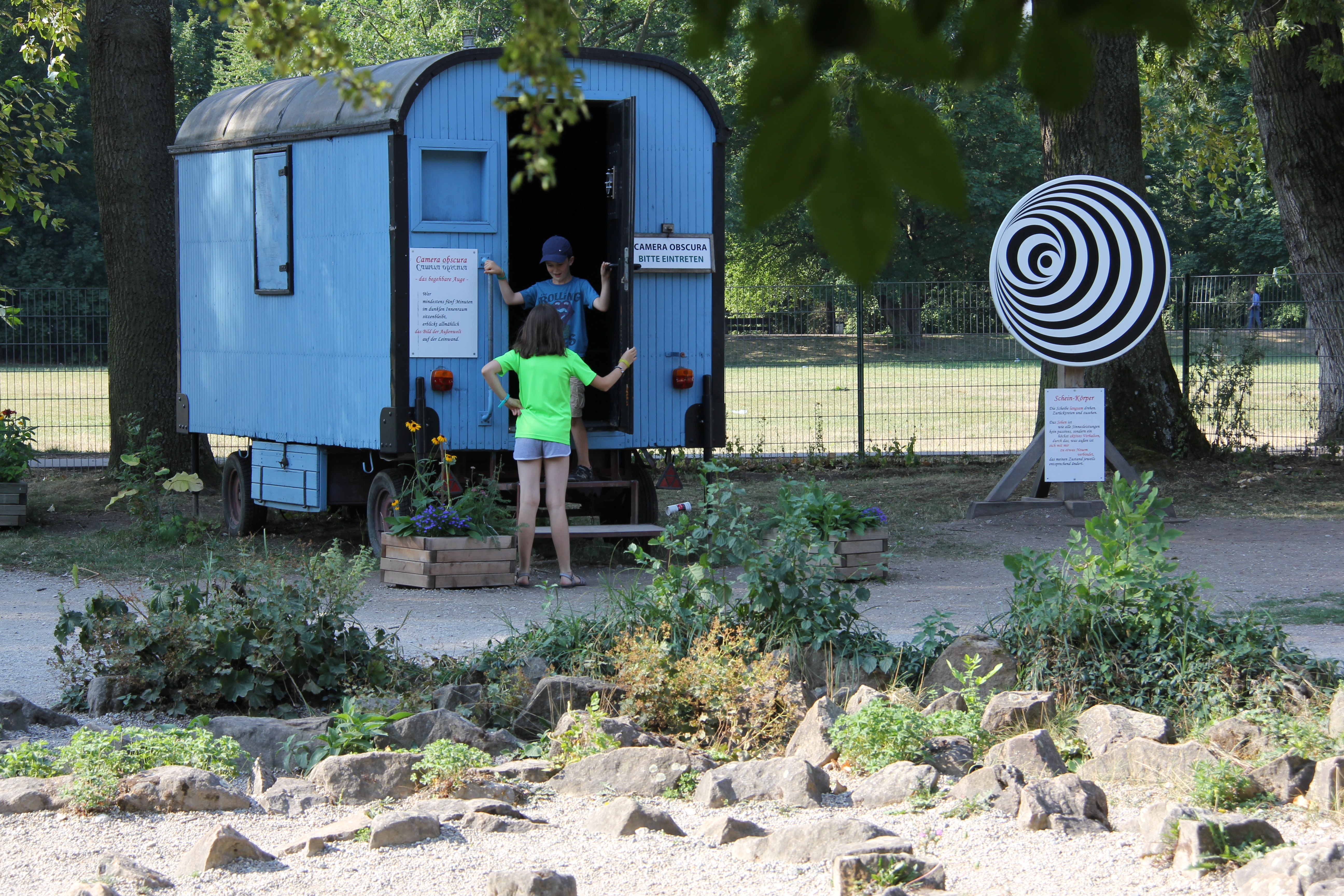 Blick auf die Camera obscura und einer optischen Scheibe (2018)